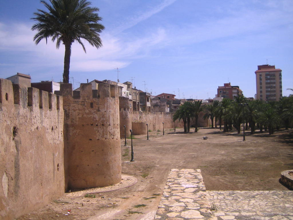 Muralla de Alzira (España).